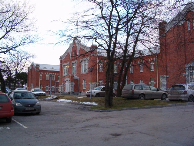 Tondi sõjaväelinnaku staabihoone